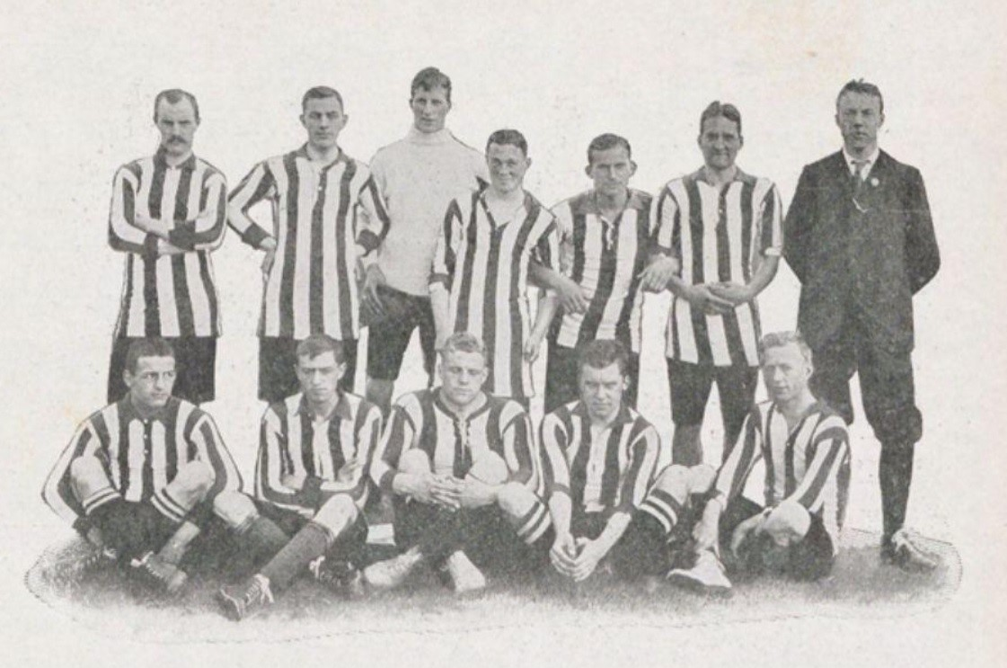 Sparta II, het elftal, dat in 1911 op den Revue-beker beslag legde. Staand van links naar rechts: Jac. v. d. Meulen, W. Klip, L. Hoogendijk, P. Niepoort {aanv.), P. W. v. Dalsum, C. Swarttouw Jr. (W. Eijmers scheidsr.). Zittend: H. Reidt, D. Boerlage, B. Benenga, W. Poortman en H. J. M. Jurgens.